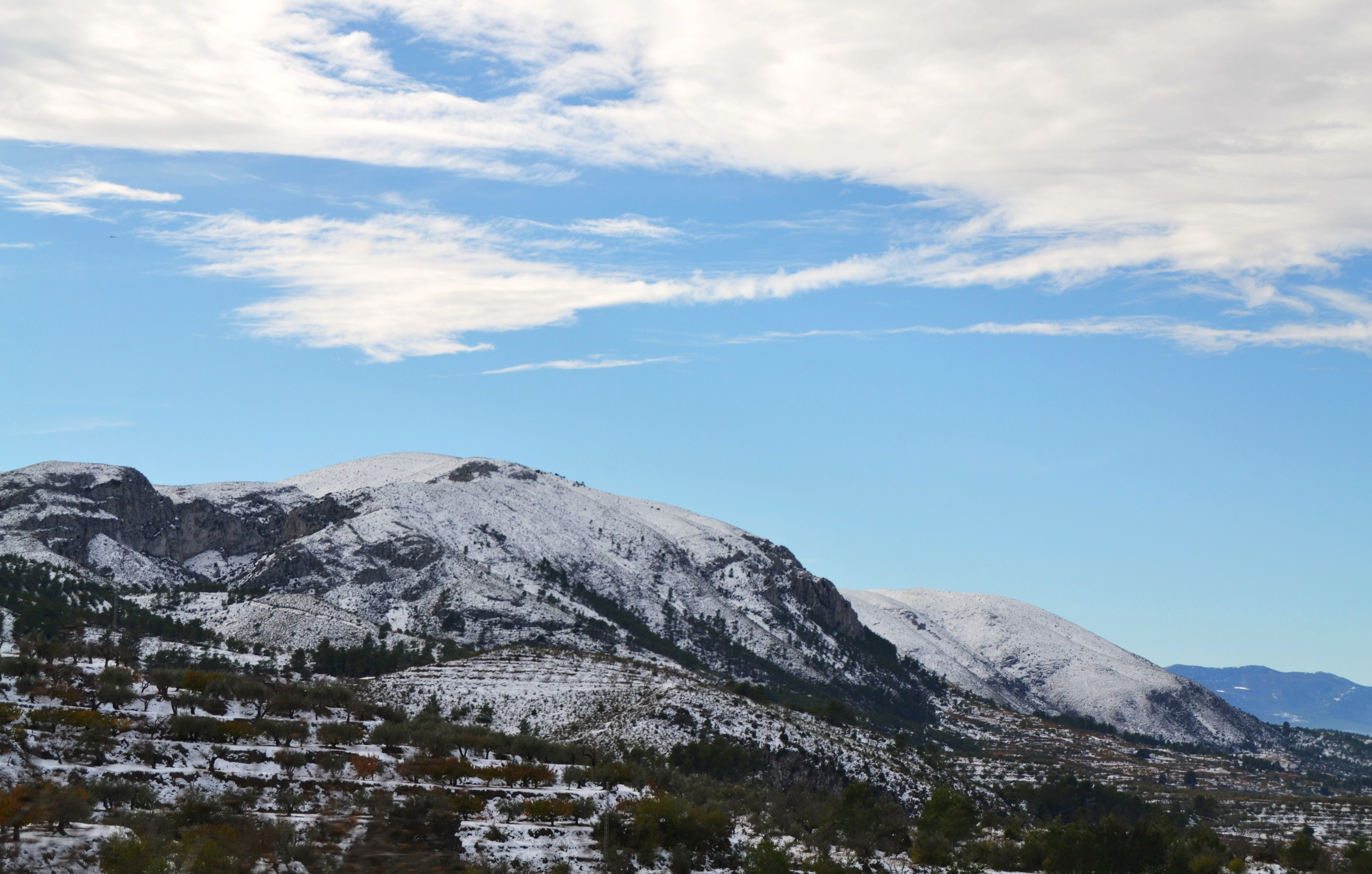 Serra d'Almudaina nevada (novembre 2013).